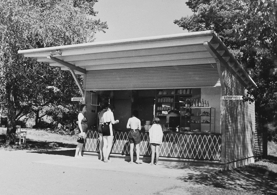 Älvsjöbadet. Serveringspaviljongen 1938.